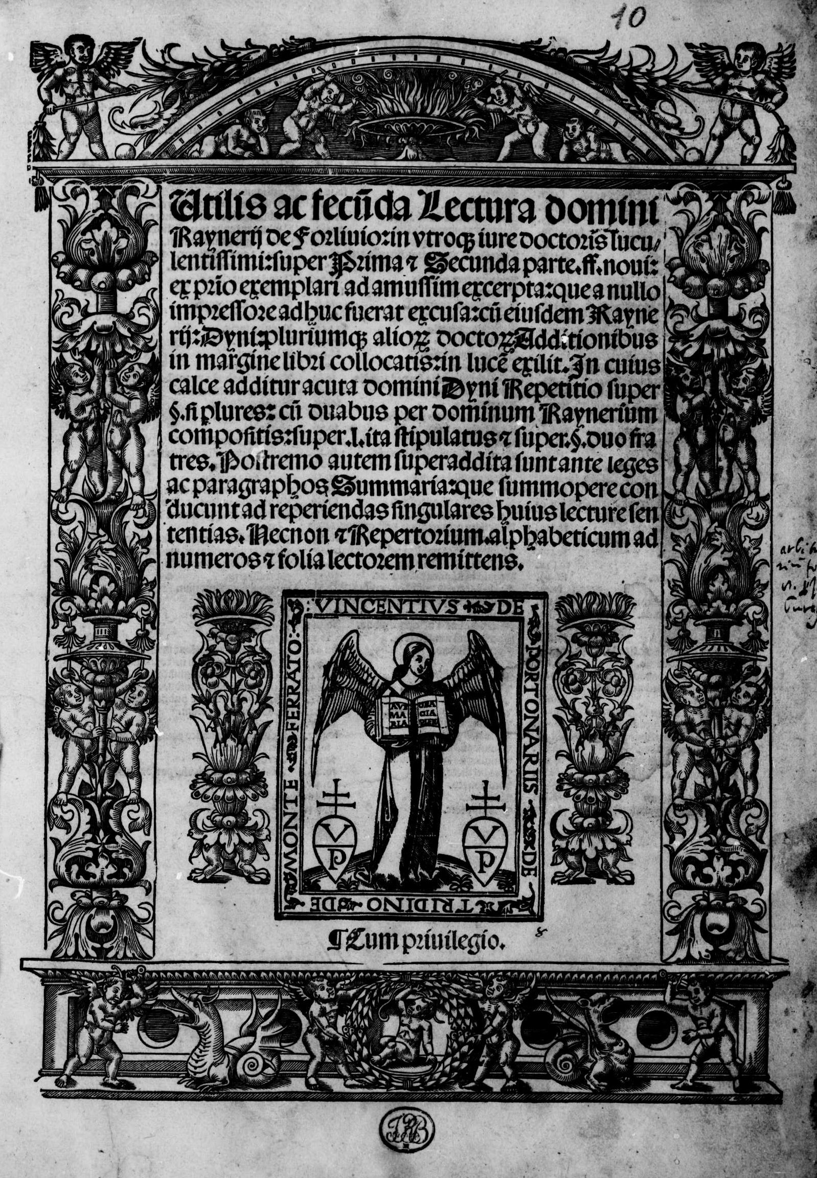 Frontespizio